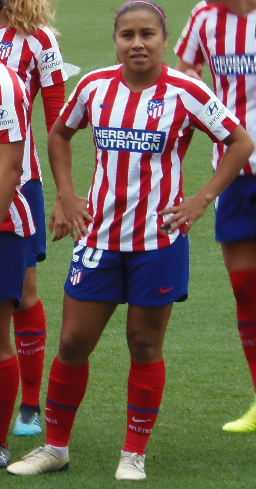 Leicy Santos en octubre de 2019